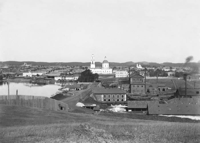 Дореволюционная панорама поселения Сысертского Завода с горы Бесёнковой